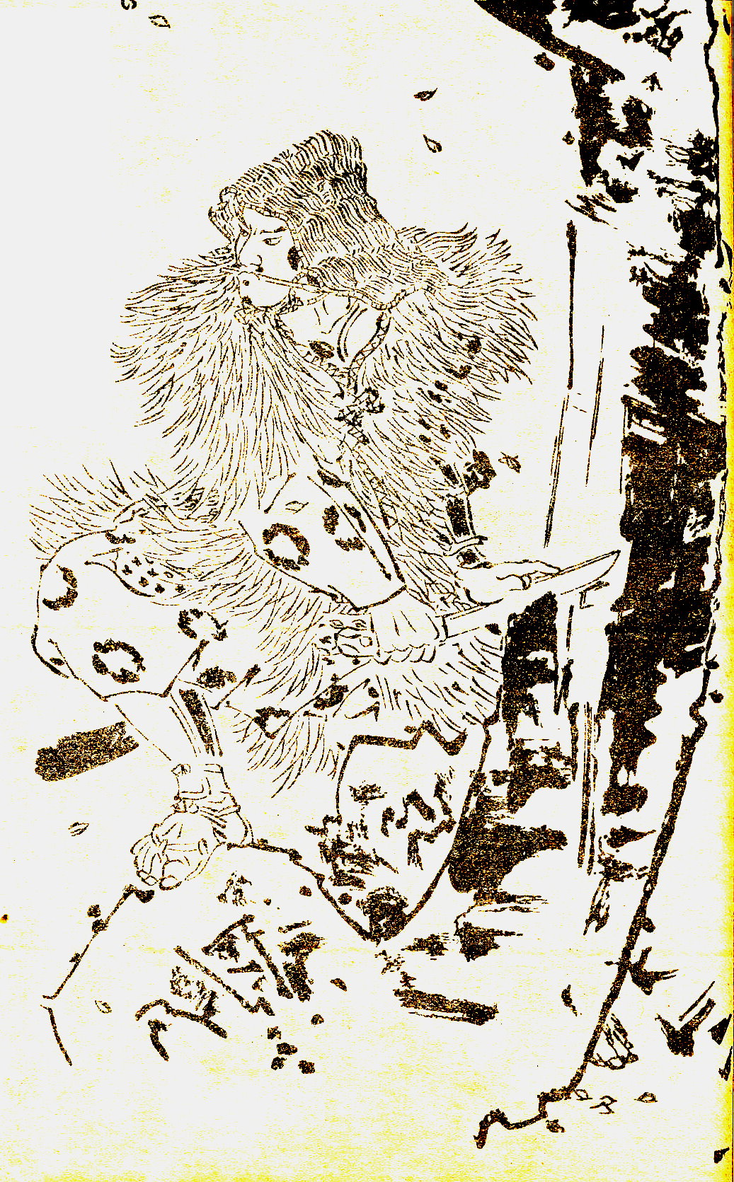 Kojima Takanori（児島高徳）was a Samurai of Japan in the latter period of Kamakura era.